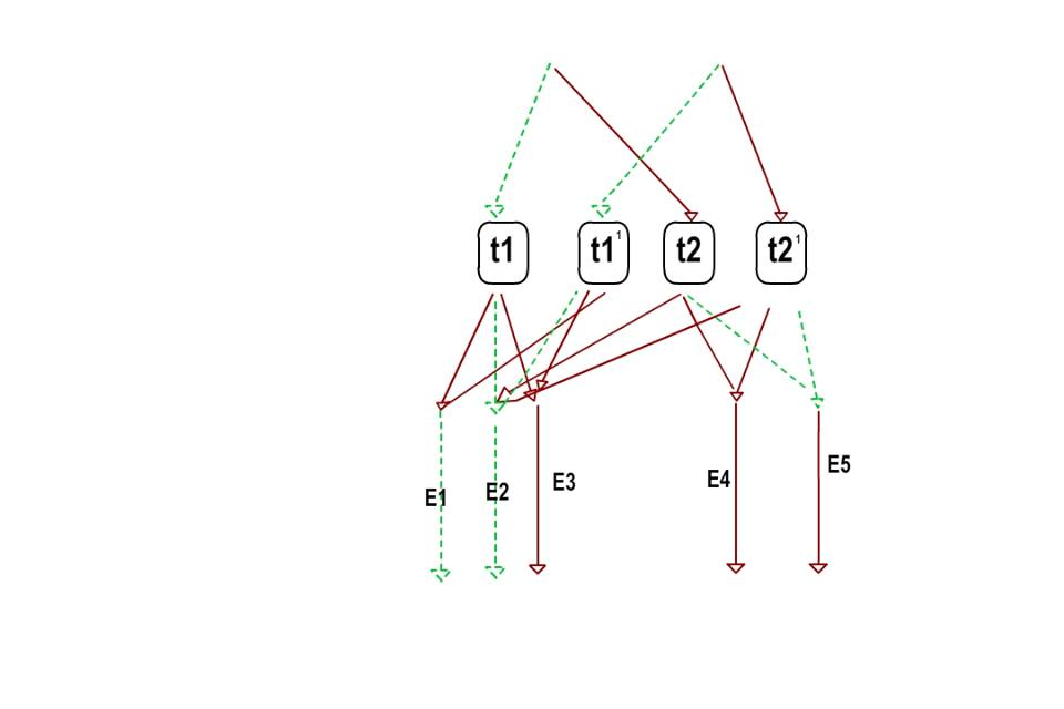 Paso 2.